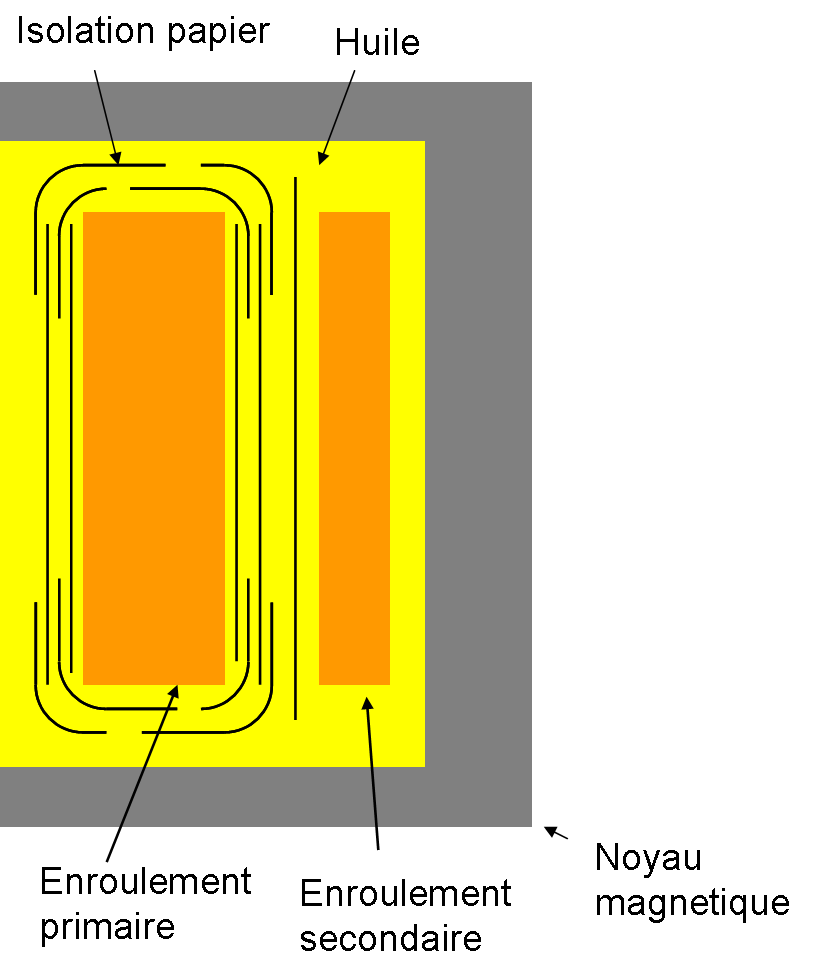 Présentation d'une isolation en barrière classique sur un transformateur